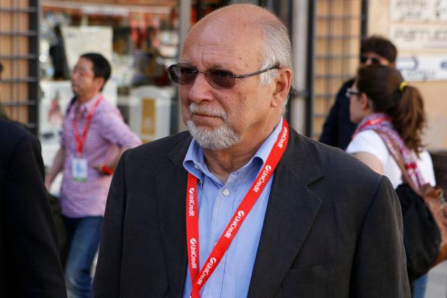 Vittorio Zucconi al Festival Internazionale del Giornalismo.